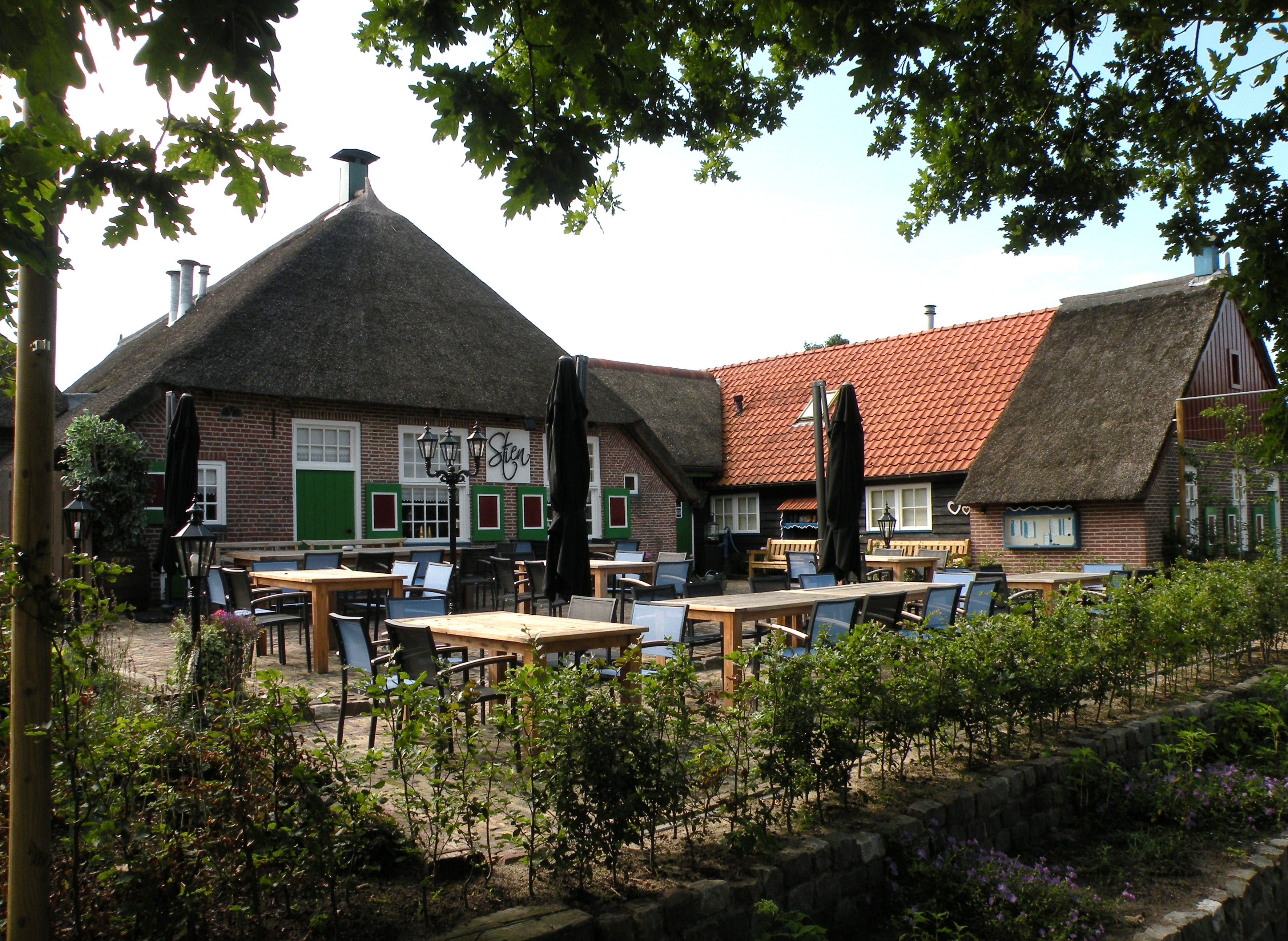 Middenwolderweg 2, Staphorst, Rijksmonument nr.34289. Voormalige witte boerderij van schilderes Stien Eelsingh